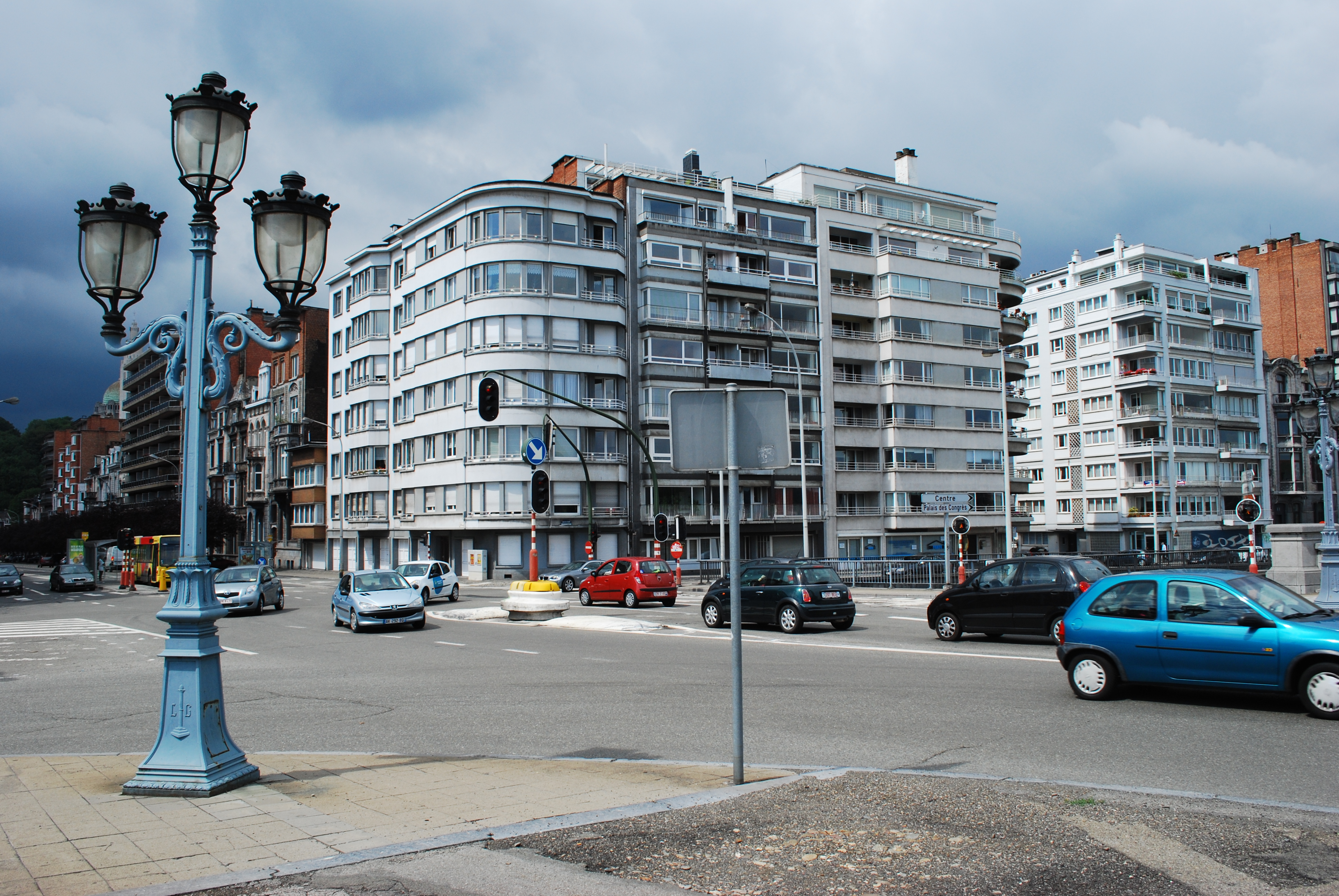 Angle de l'avenue Emile Digneffe et du quai de Rome à Liège ; à droite, l'entrée de la rue du Vieux Mayeur.